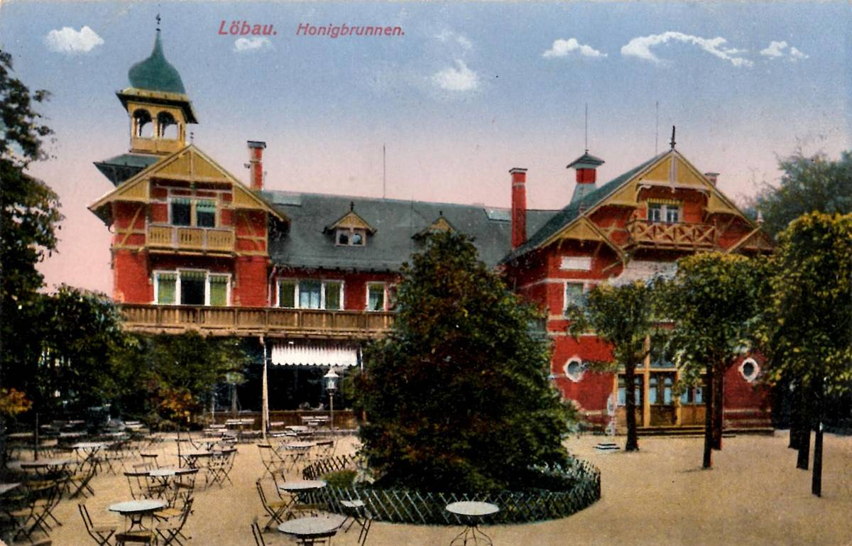 Honigbrunnen, Ansichtskarte von 1917